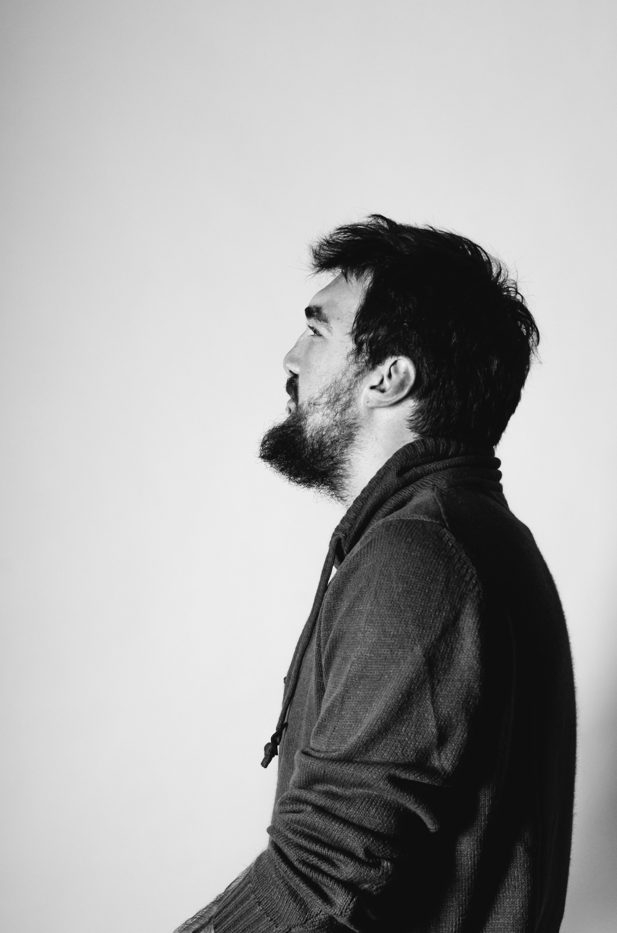 Srpski (latinica): Stefan Tićmi, srpski književnik